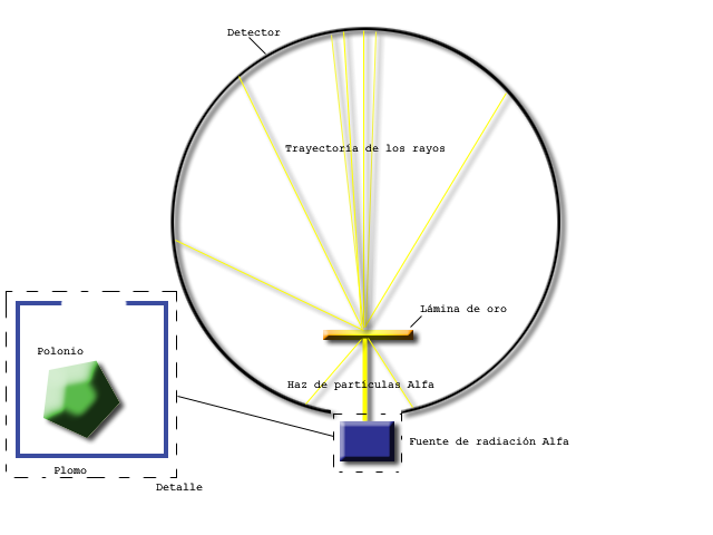 Esquema gráfico del experimento de Rutherfod